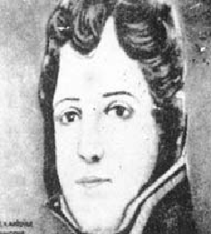 Alejandro Francisco Augusto - Conde de Grasse Tilly. Llevó la reformada masonería americana a Francia.